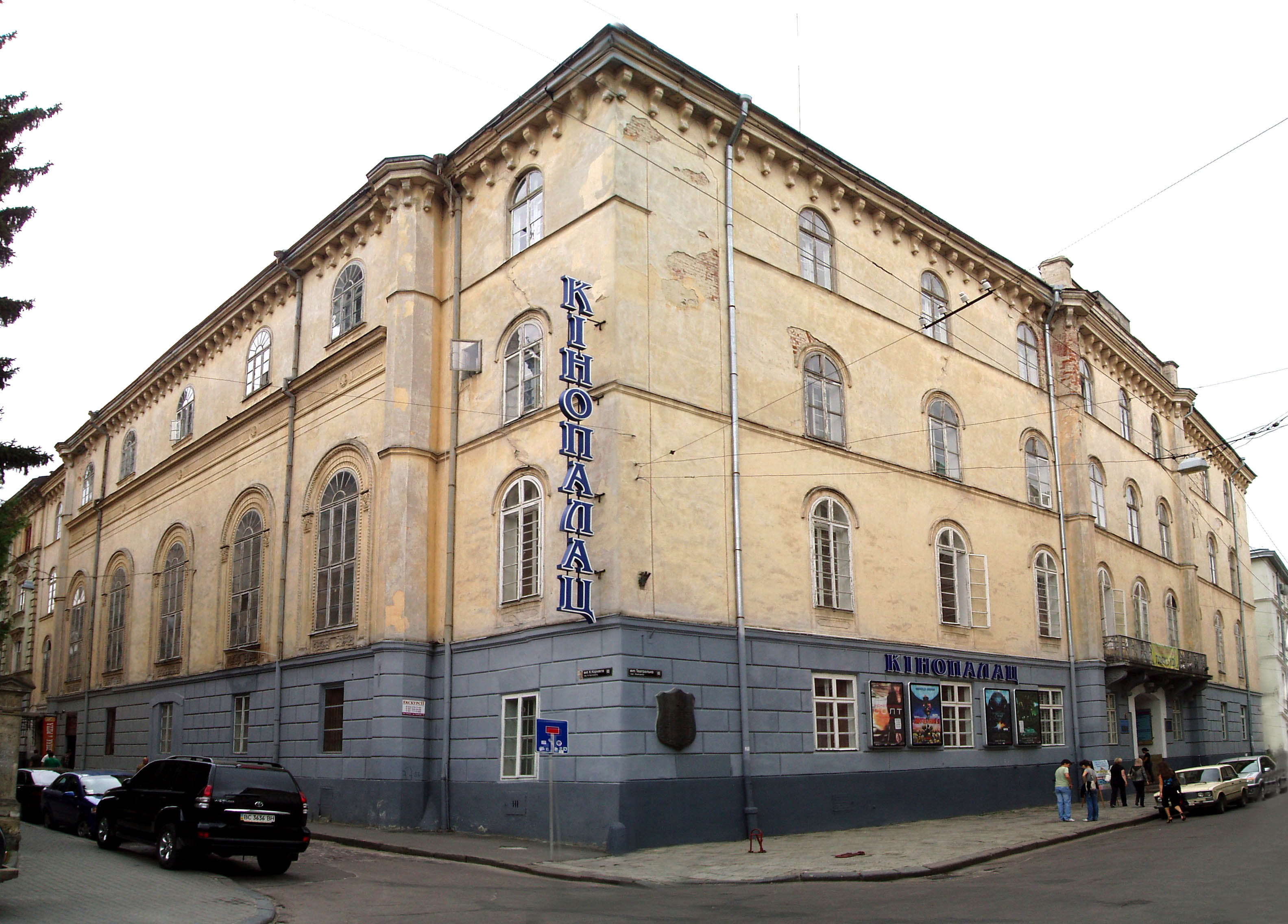 Будівля колишнього народного дому у Львові на вулиці Театральній, 22. Збудований за проектом Вільгельма Шмідта і Сильвестра Гавришкевича у 1851—1864 роках.